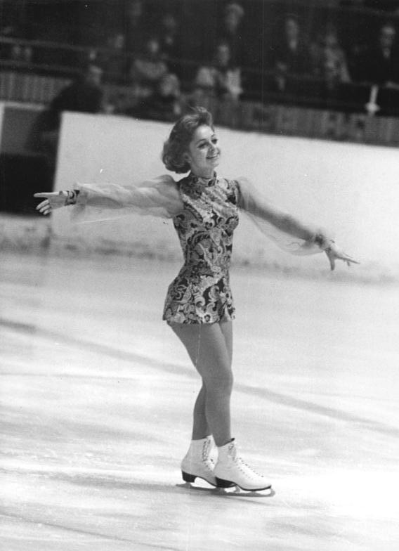 Sonja Morgenstern ADN-ZB Mittelstädt 18.12.1971 Berlin: DDR-Eiskunstlaufmeisterschaften im Berliner Sportforum.- Souverän verteidigte Sonja Morgenstern (SC Karl-Marx-Stadt) ihren Titel. Als letzte der acht Bewerberinnen gestartet, bot die 16jährige EM-Vierte von 1971 ein fehlerfreies Programm und siegte mit klarem Vorsprung vor der Konkurrenz.